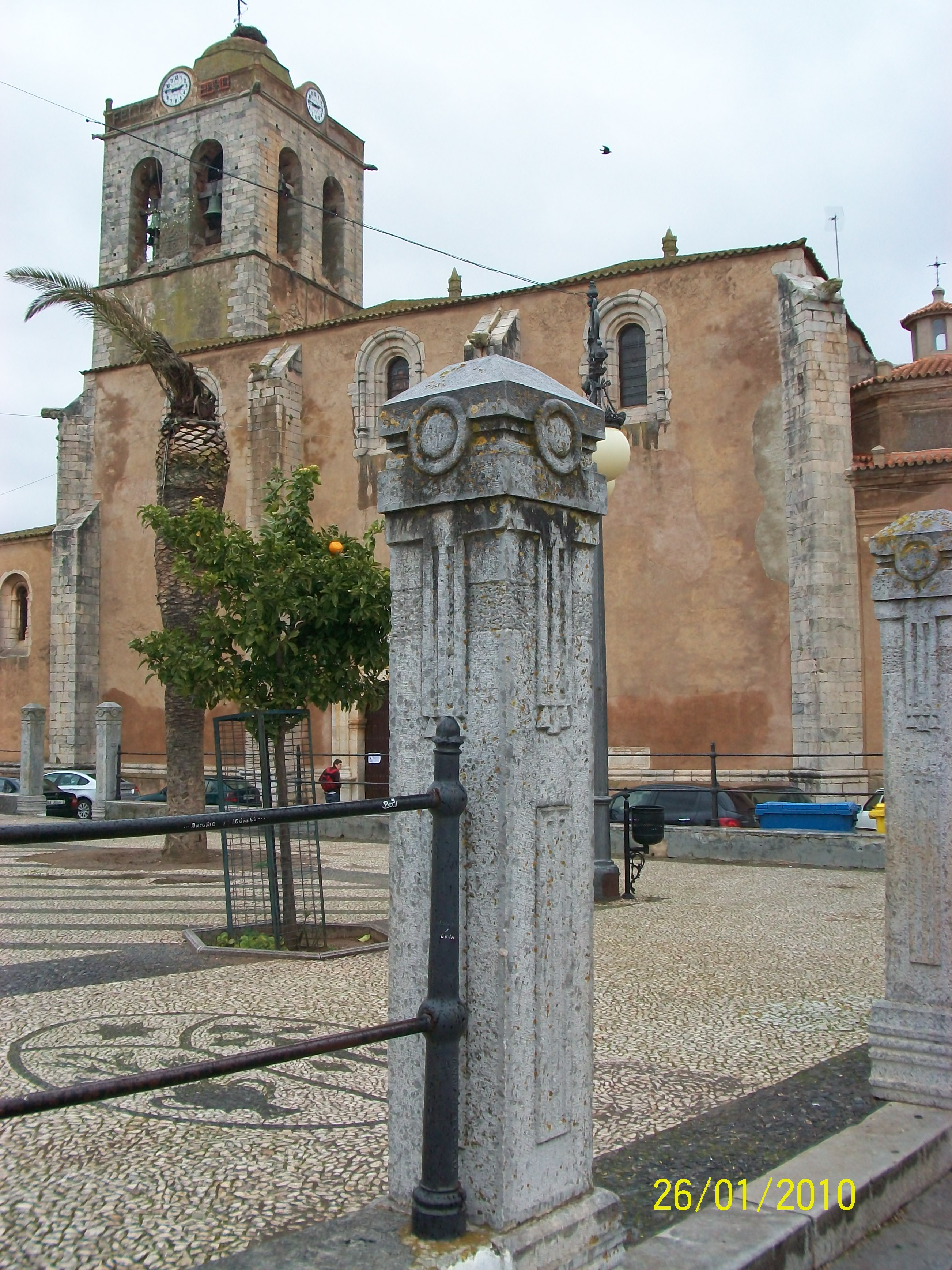 Los Santos de Maimona.